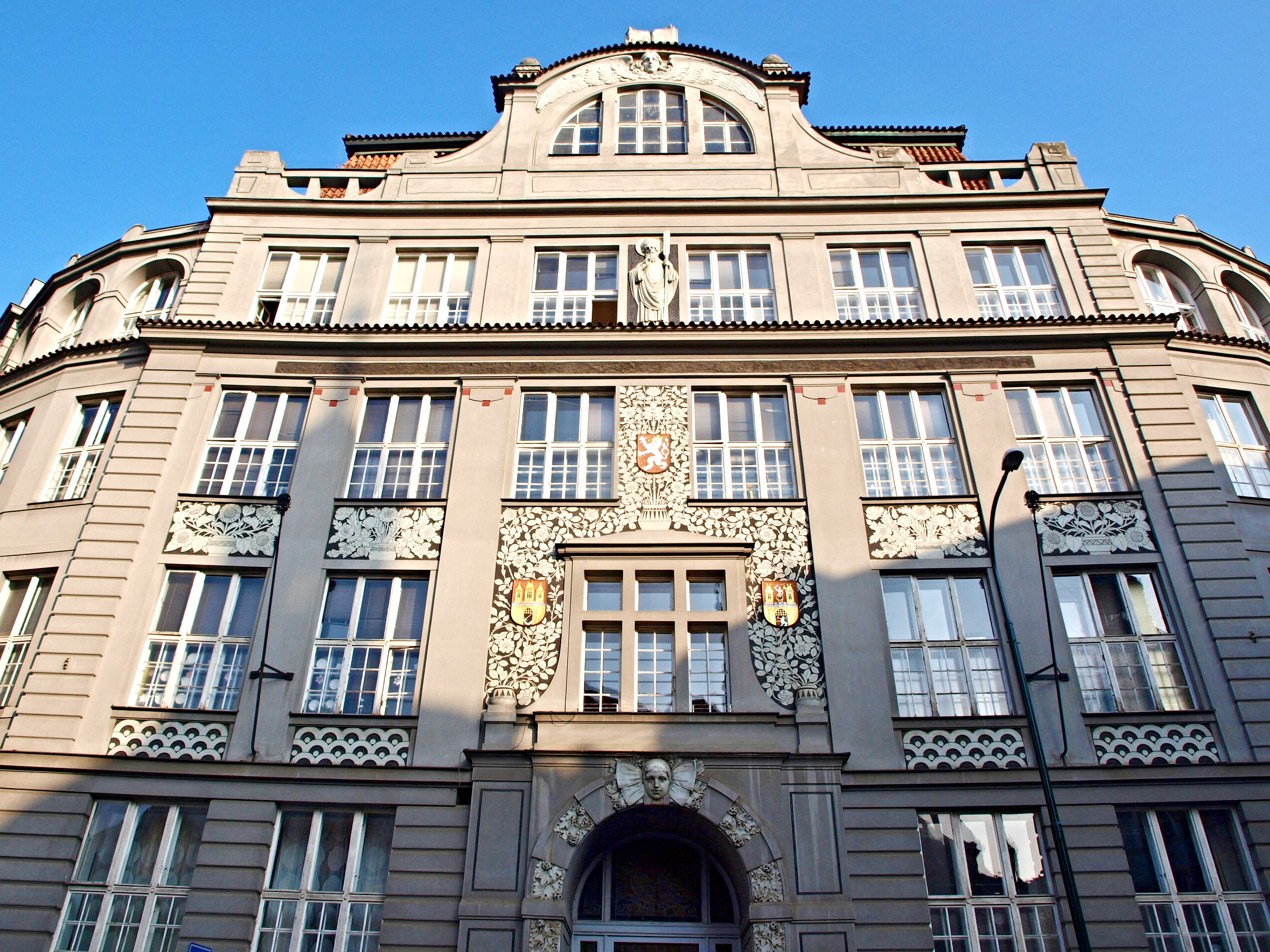 Praha, ZŠ Brána jazyků